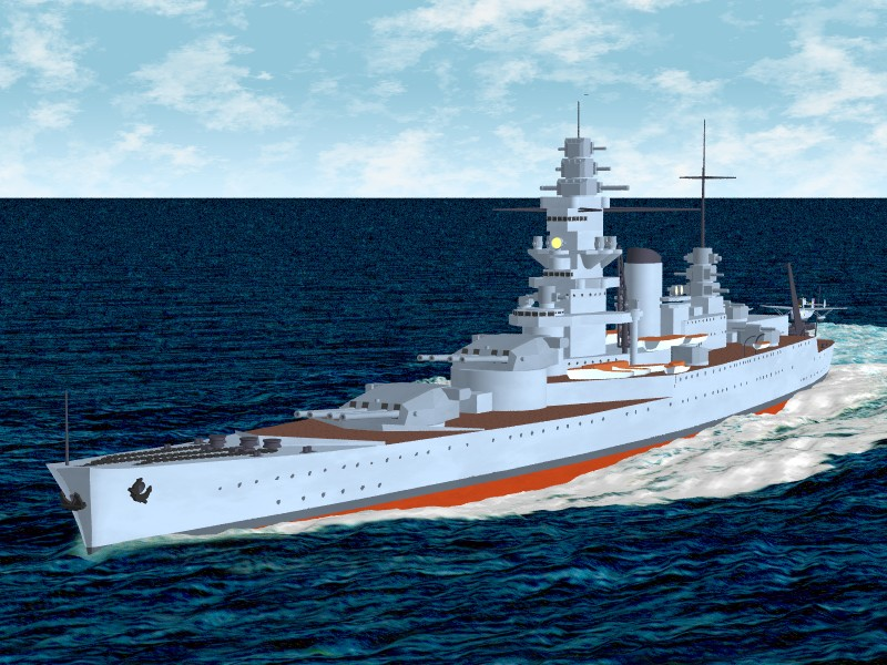 Croiseur de bataille Dunkerque (1935, France), modèle 3D simple créé avec POV-Ray.